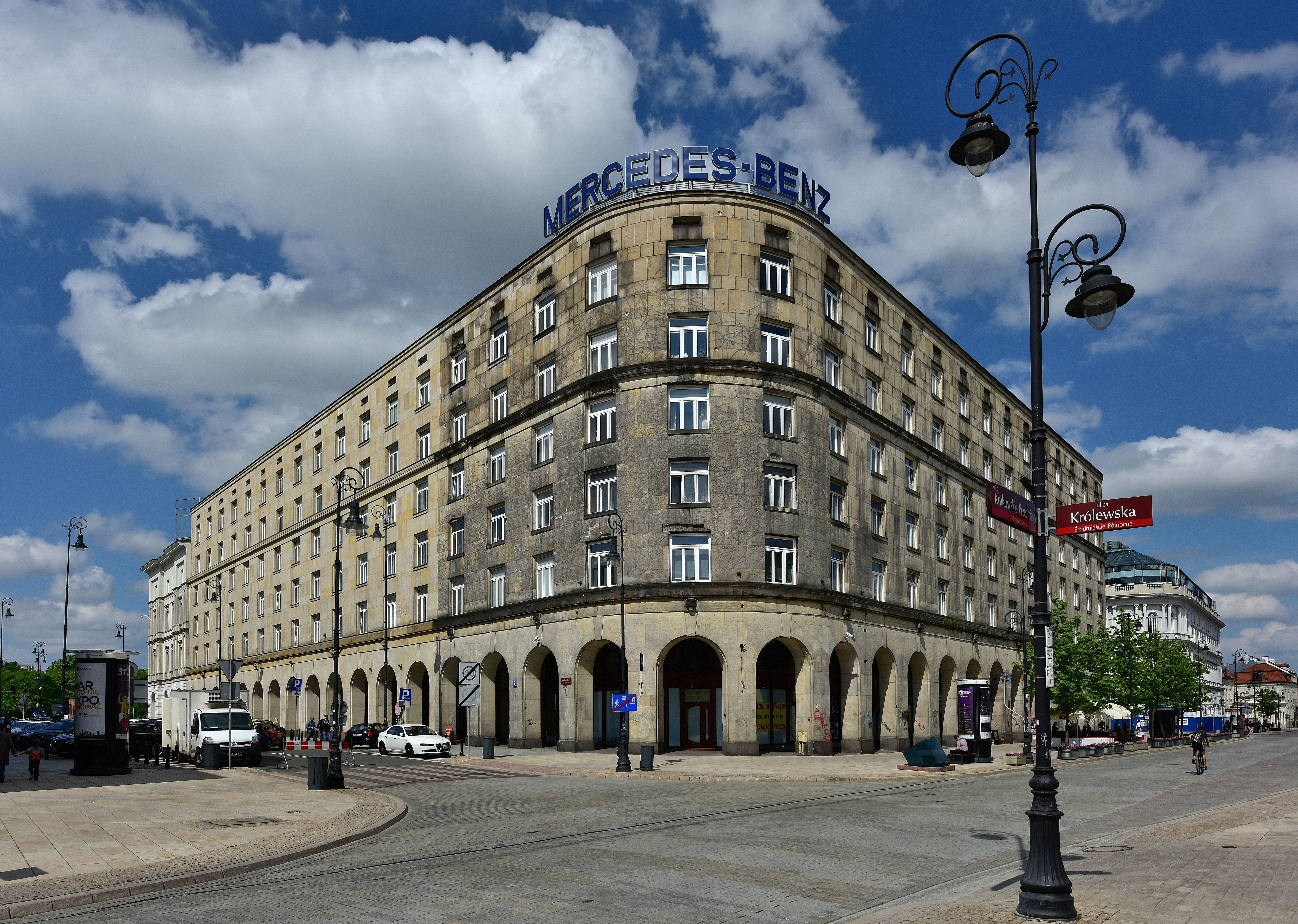 Dom Bez Kantów w Warszawie